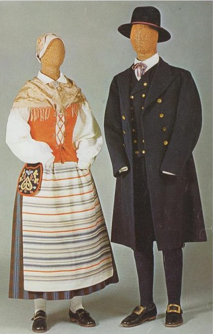 Stora Kopparbergdräkten för man och kvinna.